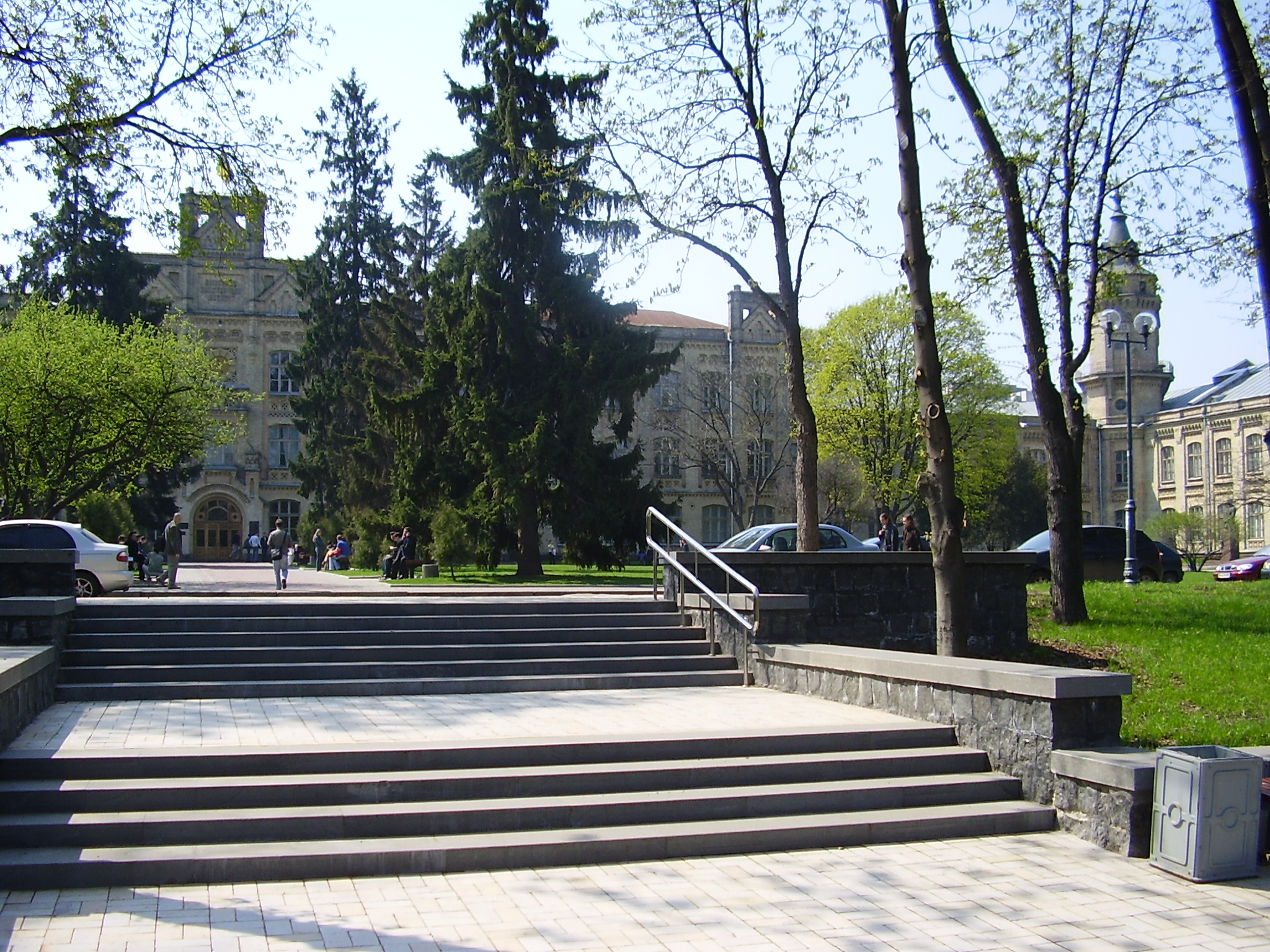 KPI - Building #1, from the center :: Первый корпус политеха, на подходе по лестнице